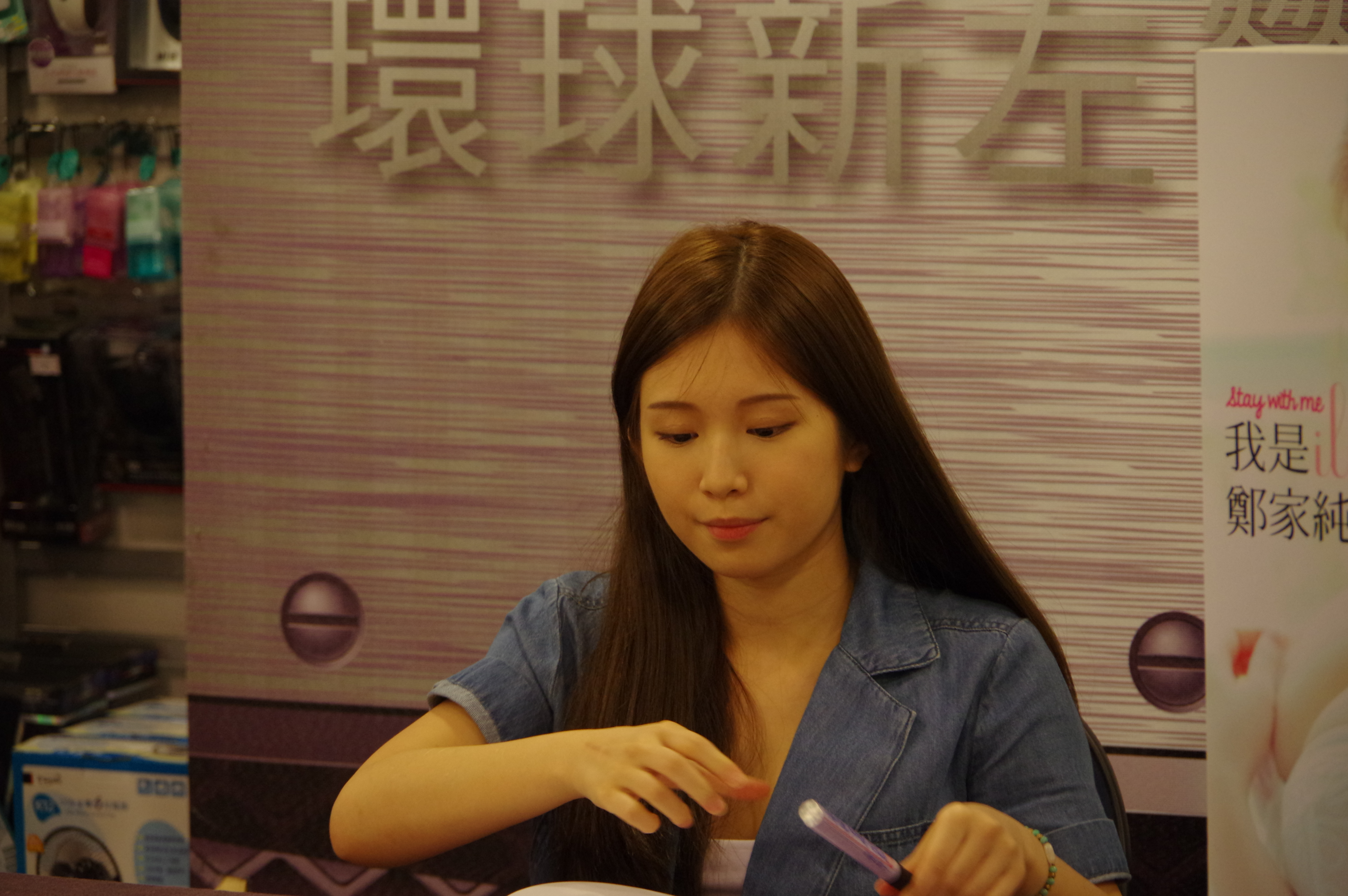 臺灣藝人鄭家純